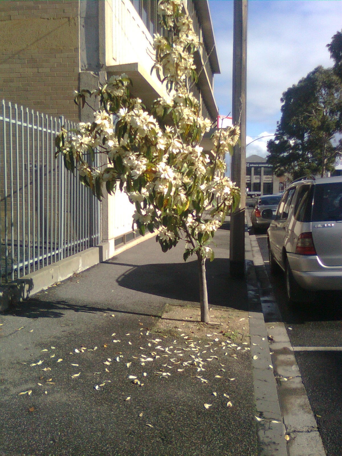 अनंताचे लहान झाड. मेलबर्न येते घेतलेले चित्र